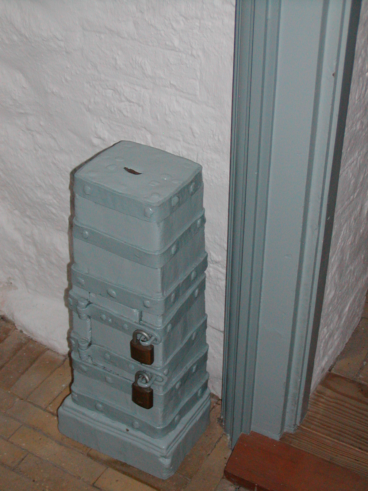 Den gamle kirkebøsse i Skævinge Kirke